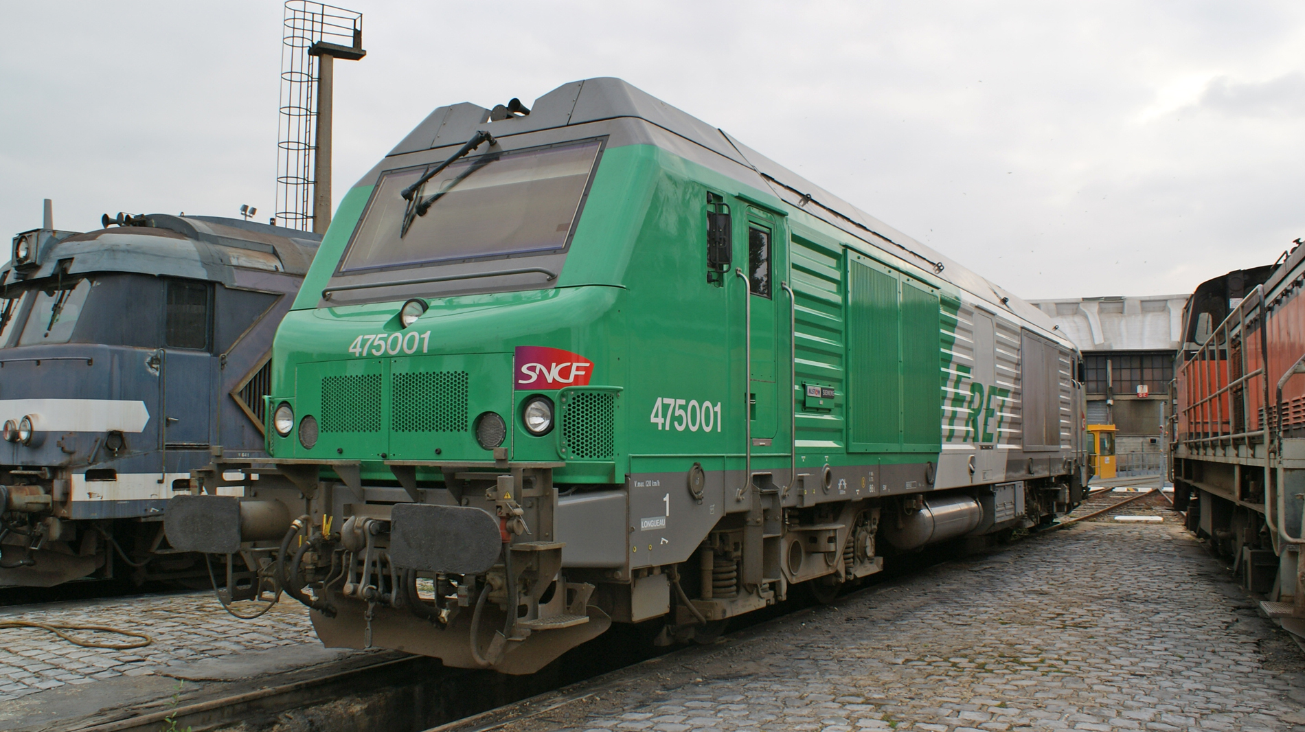 BB 75001 à Longueau